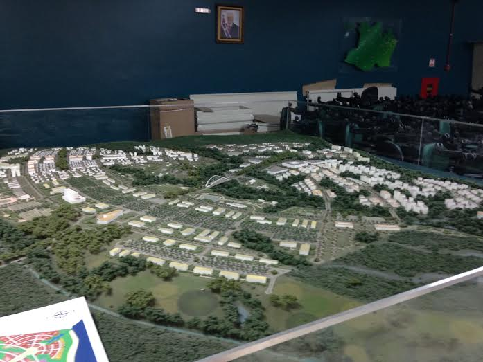 Maquete da Cidade Universitária da UEA